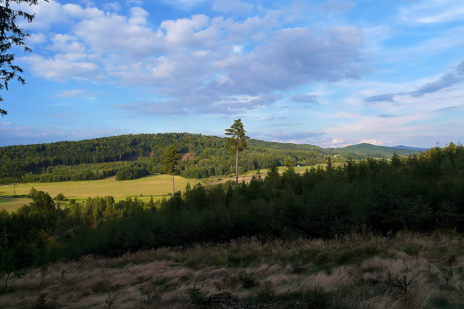 Prachovský hřeben z vrchu Houser: zleva Svinčice, Přivýšina, vzadu Kumburk